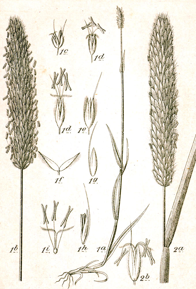 1: Alopecurus pratensis L. 2: Alopecurus arundinaceus Poir. Original Caption 1. Wiesen-Fuchsschwanz, Alopecurus pratensis L. 2. Rohr-Fuchsschwanz, A. arundinaceus Poir.